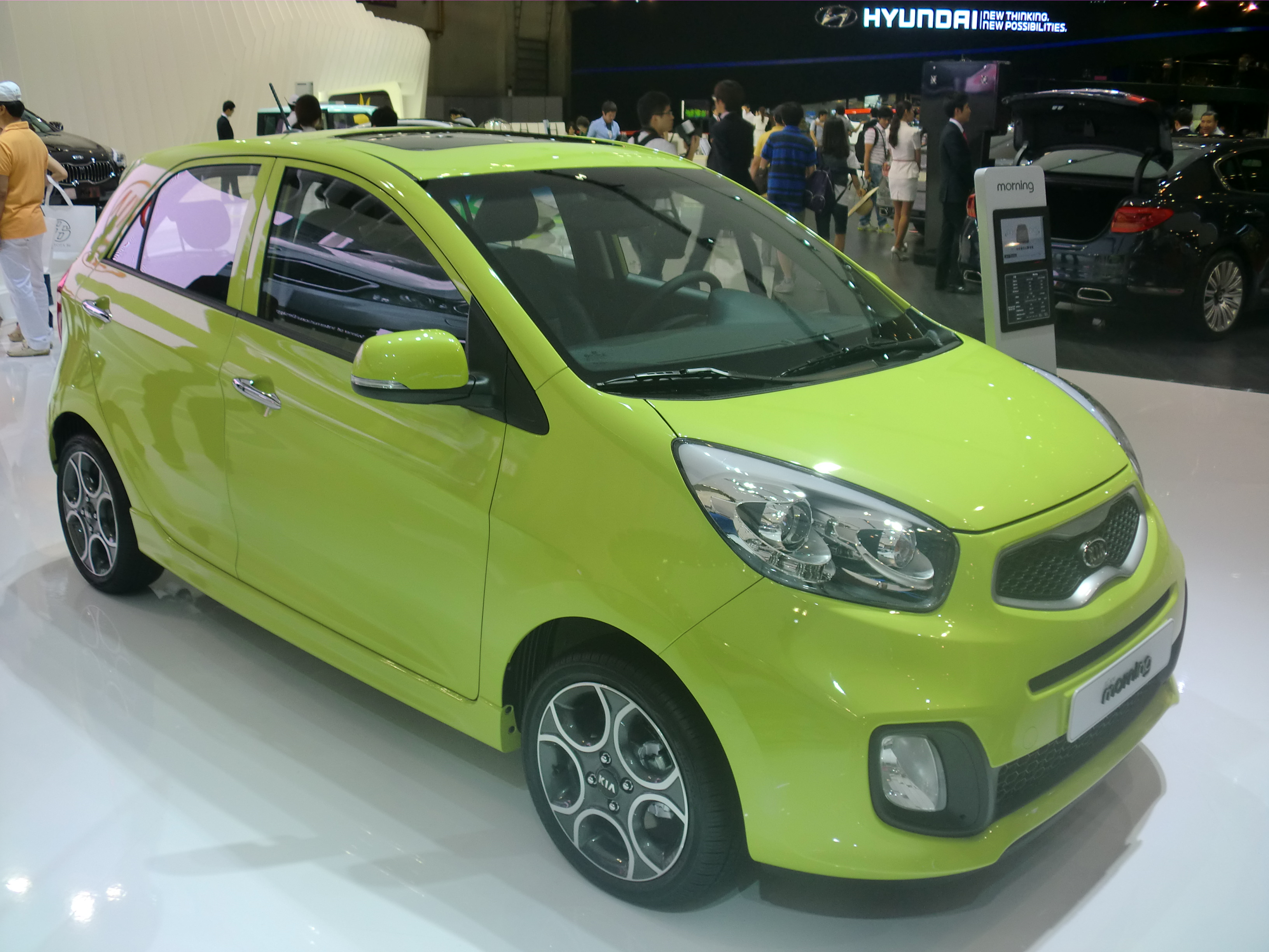 2012부산국제모터쇼에 전시된 기아 모닝